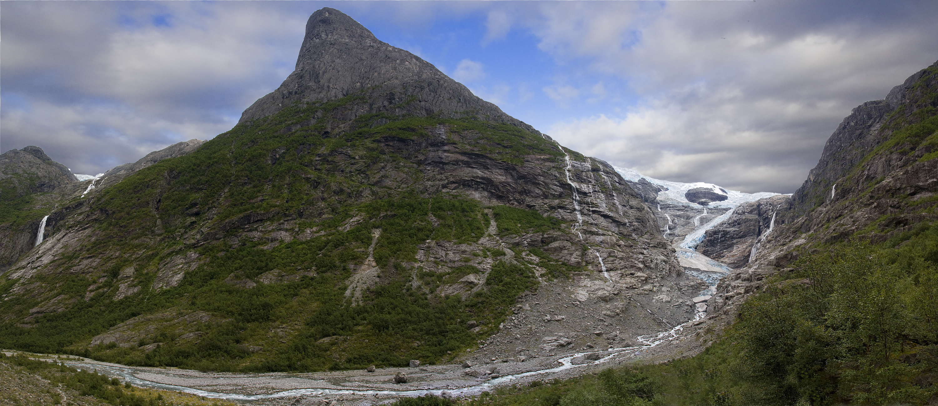 Kjenndalen glacier (no: Kjenndalsbreen) in Kjenndalen in Stryn, Norway